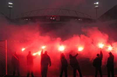 Ceremonie ter nagedachtenis aan de overleden voetballer David di Tommaso in Stadion Galgenwaard (Utrecht)